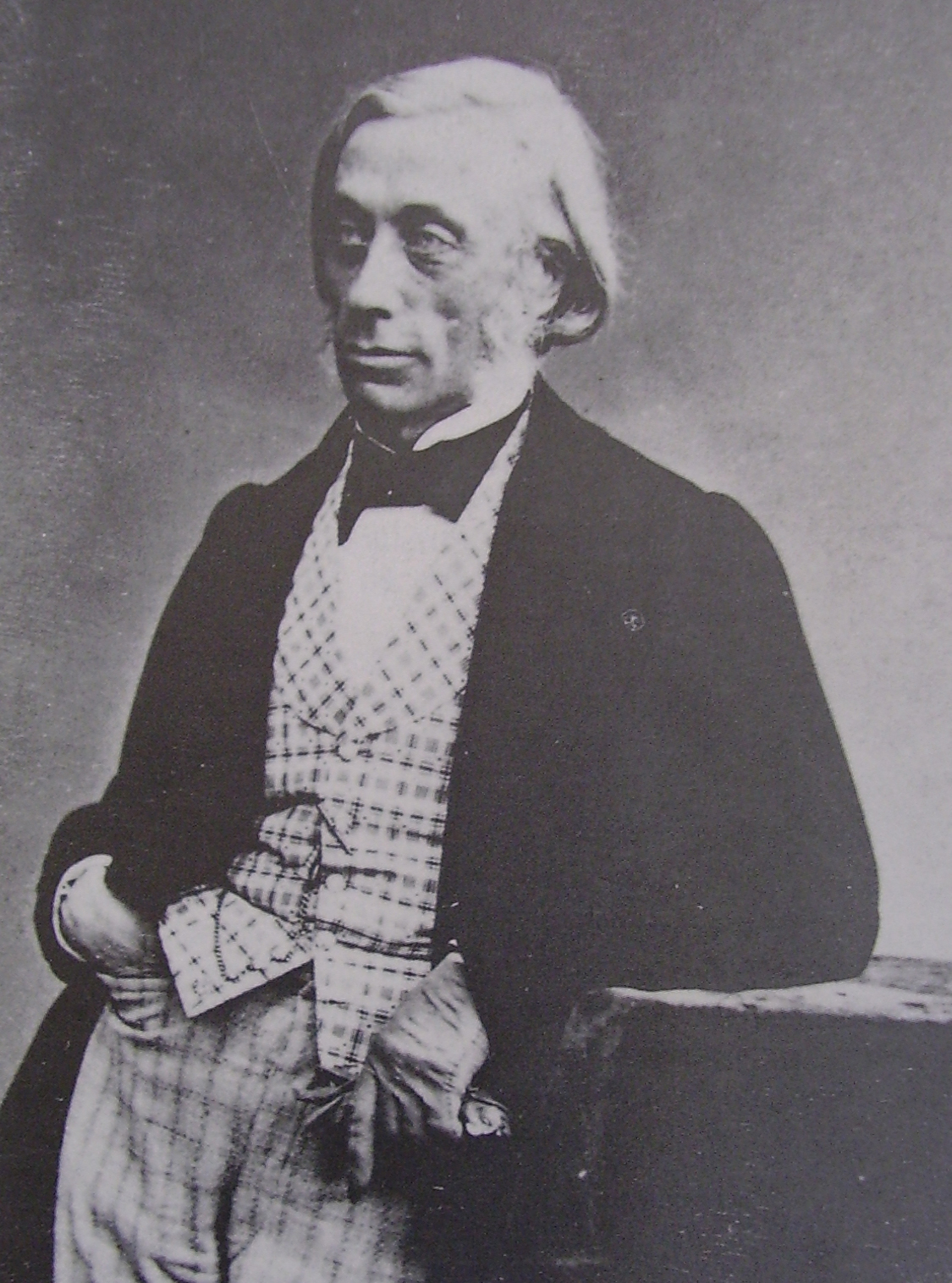 French philosopher Félix Ravaisson